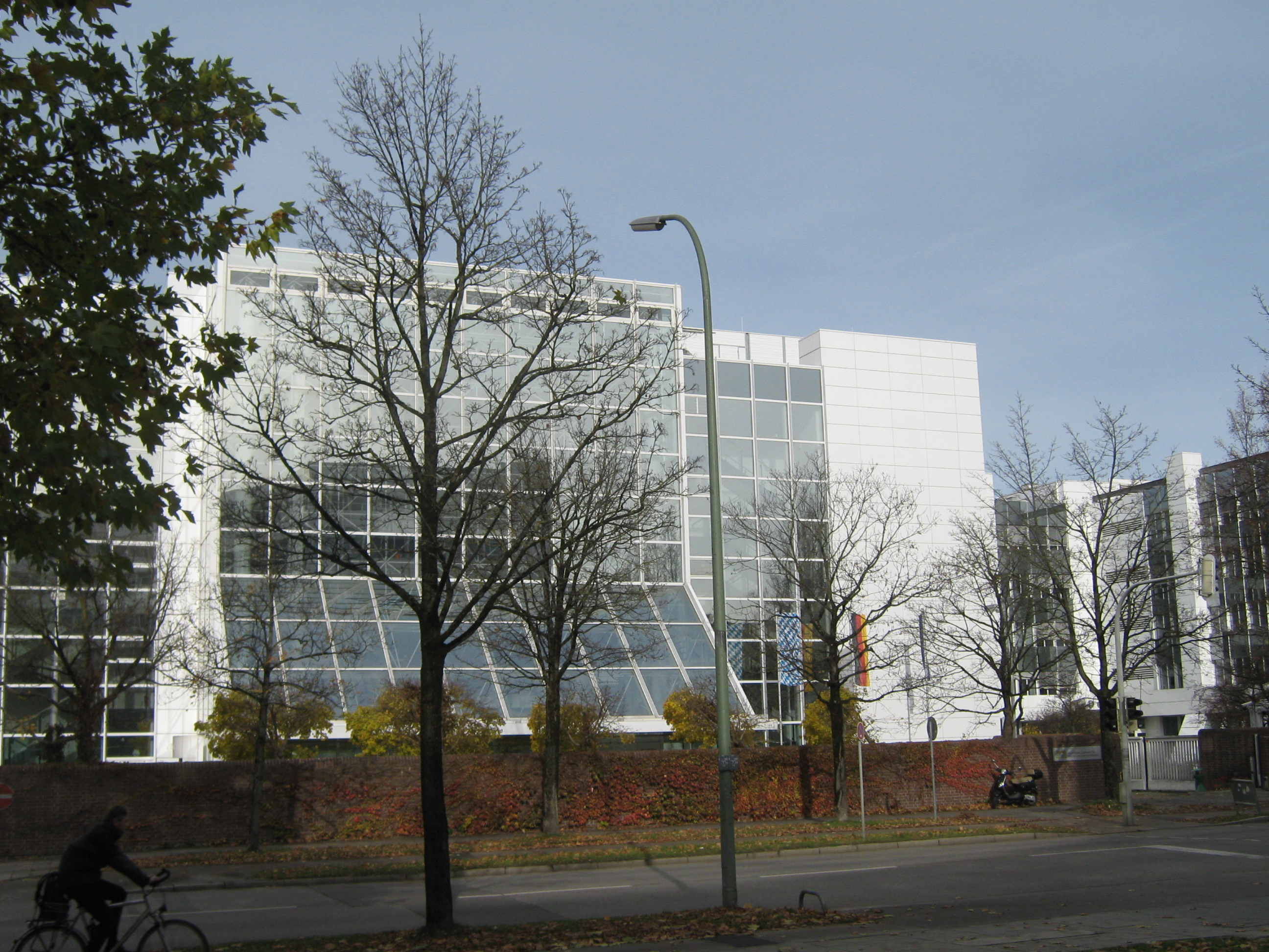 Bayerisches Landesamt für Statistik und Datenverarbeitung, Dienststelle München, St.-Martin-Straße 47 (seit 2012)